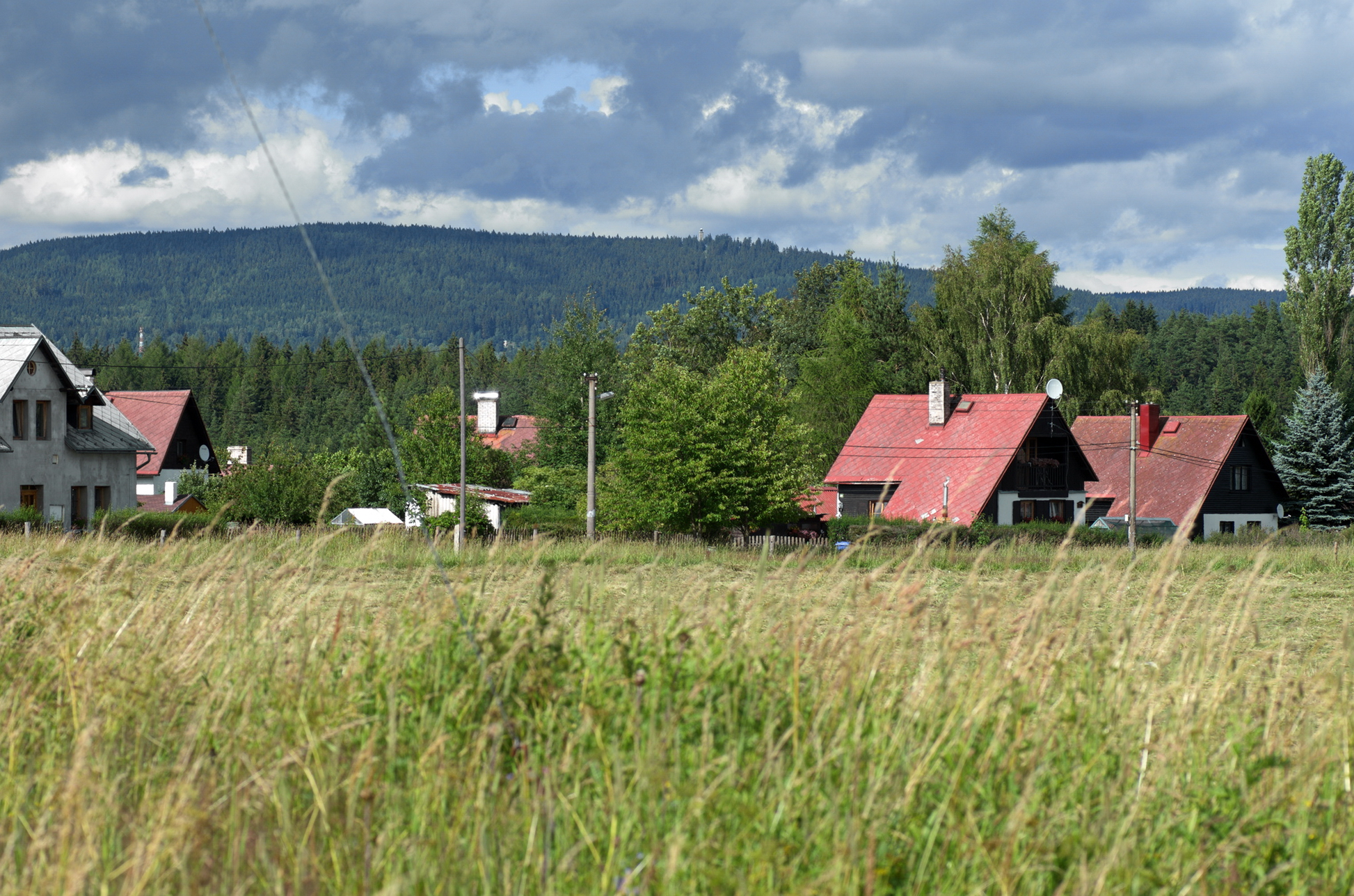 osada Poušť (Jindřichovice), okres Sokolov